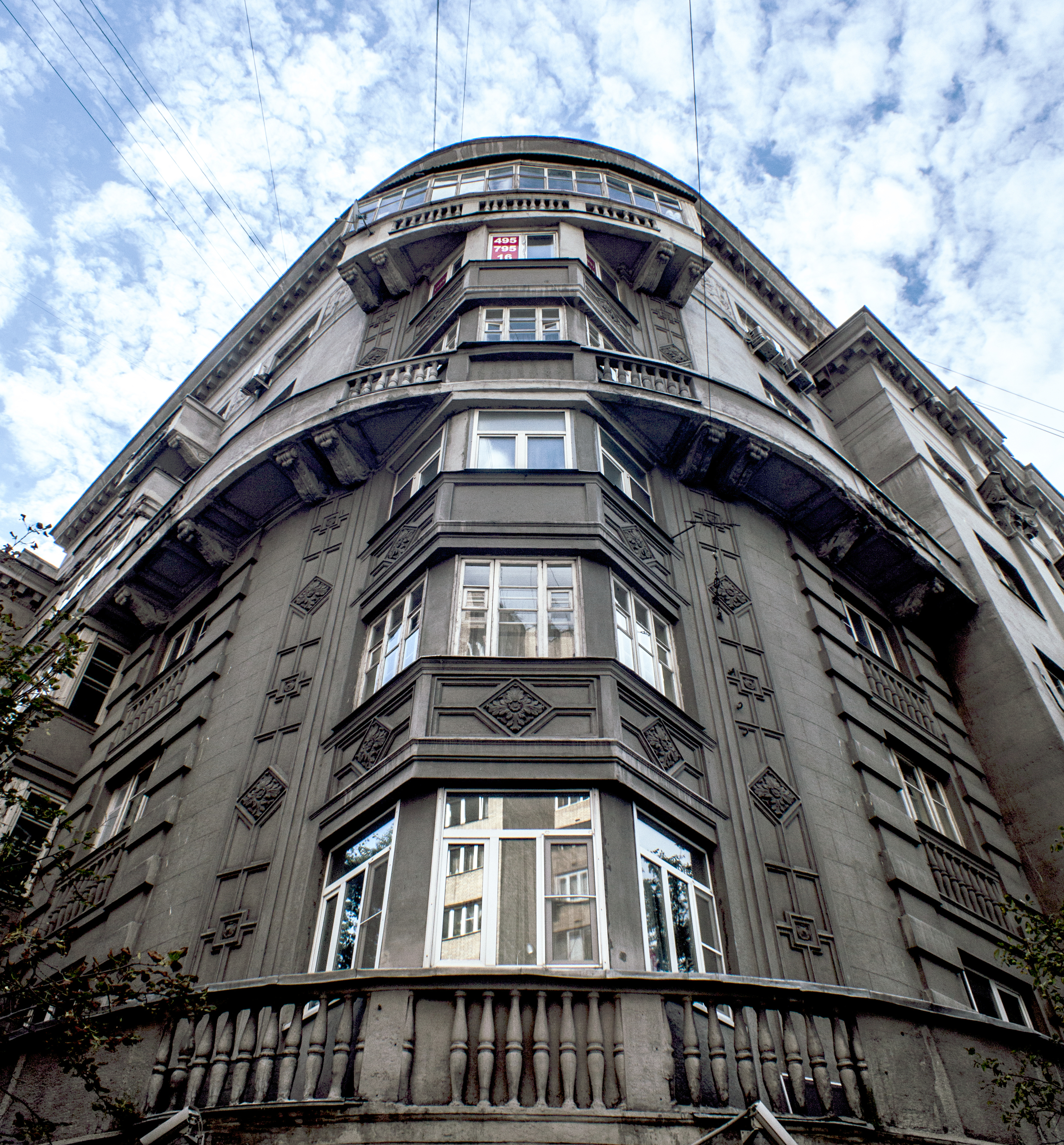 Москва, Воротниковский пер, 5/9